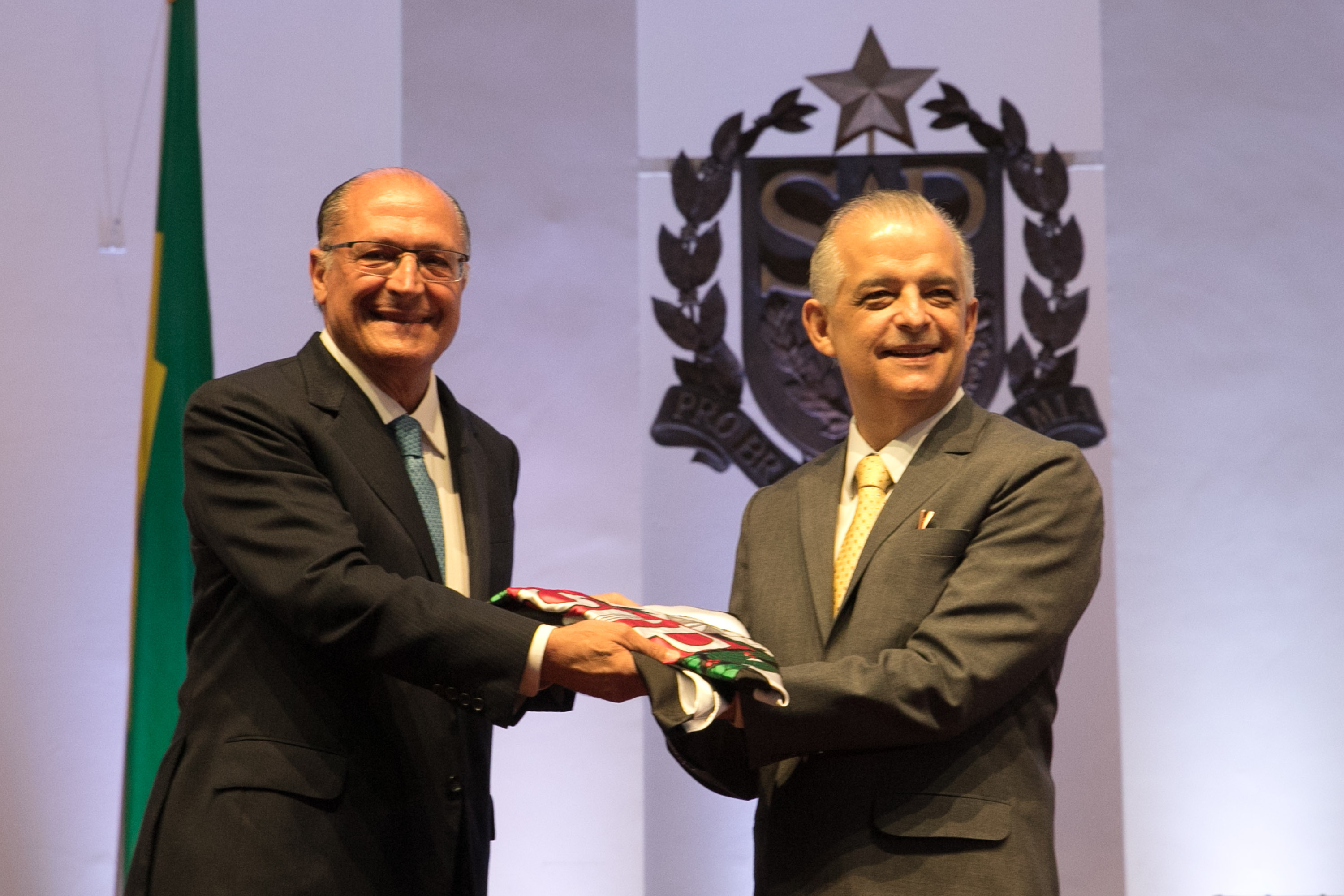 Geraldo Alckmin passa o cargo a Márcio França